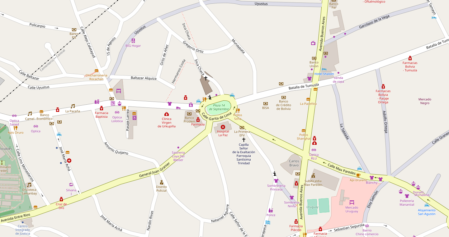 Mapa OpenStretmap de la Plaza Garita de Lima/14 de septiembre en la ciuda de la paz actualñizado al 29 de enero de 2019